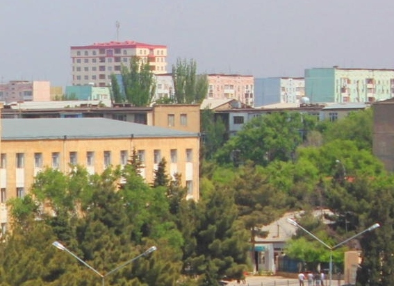 Sumqayıt Dövlət Universitetinin II korusu